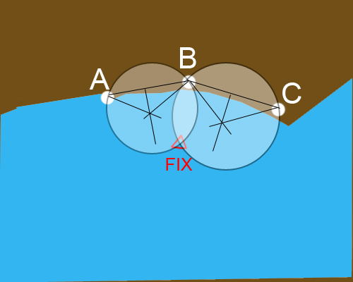 dit is een schets van de snelliusconstructie mbv 3 peilingen